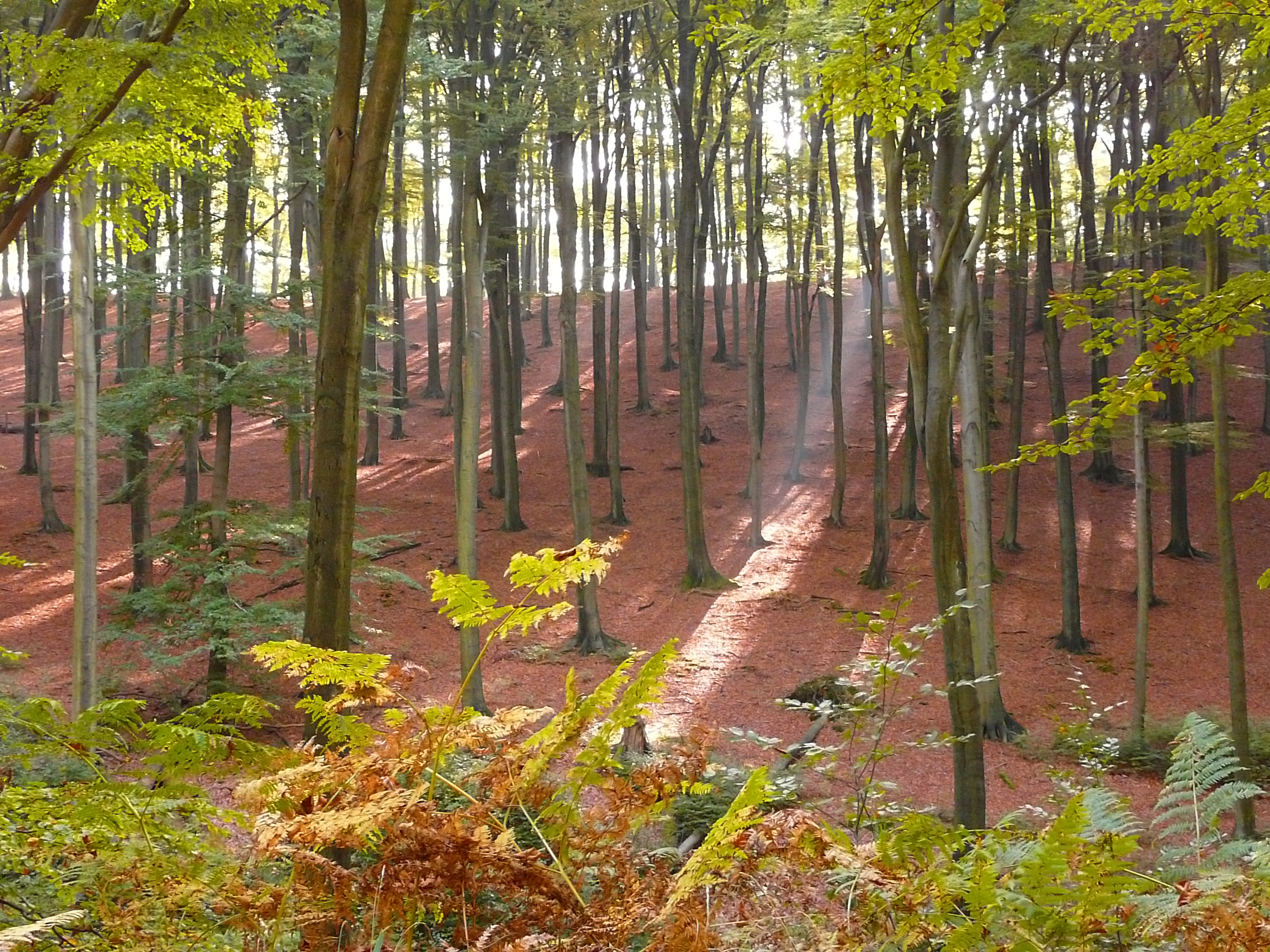 NSG SO-029, Hallenbuchenwald im nördlichen Arnsberger Wald